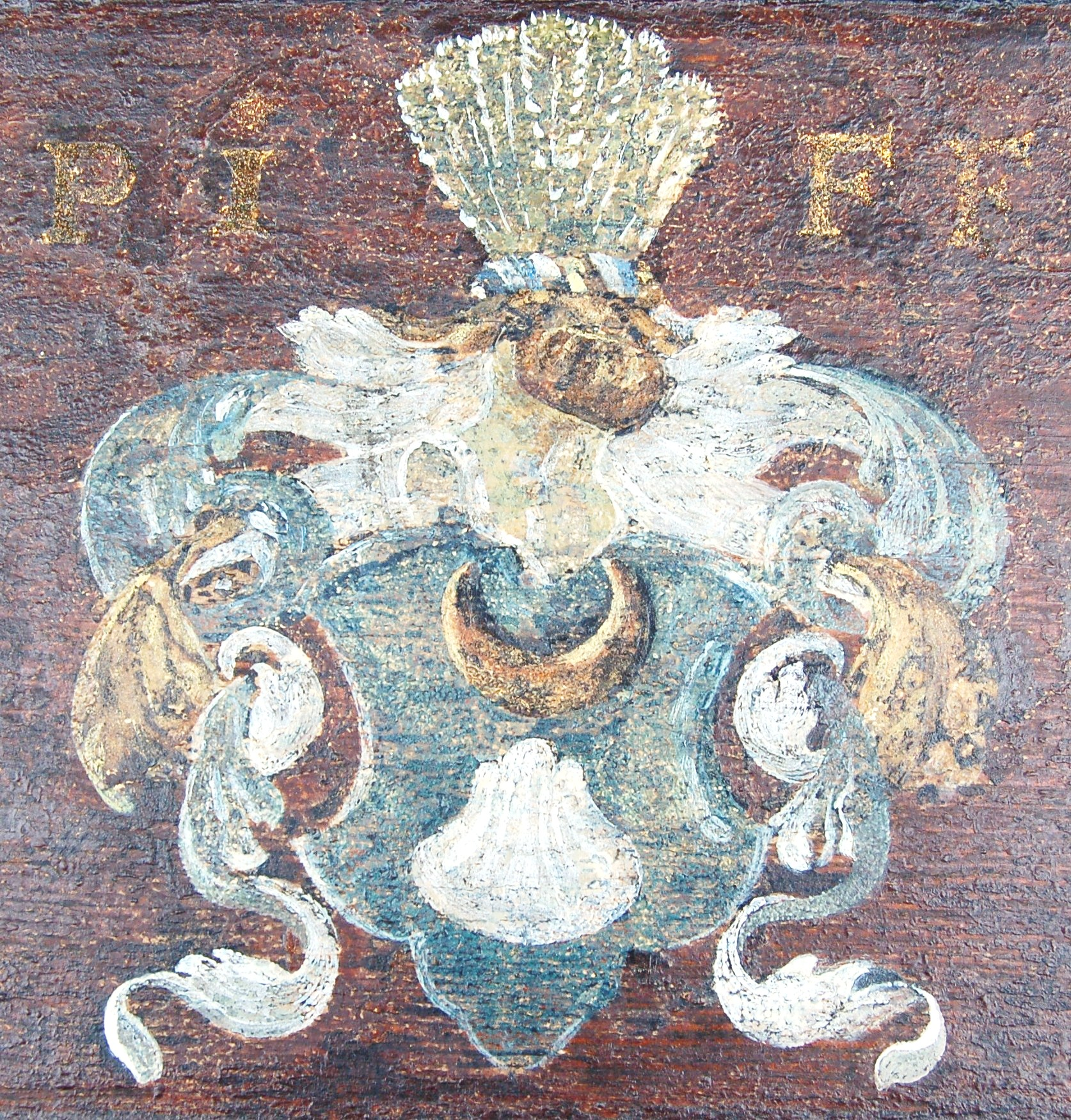 Våpenskjold Baden Tanum kirke